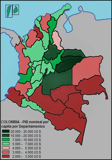 Mapa que muestra los Departamentos de Colombia, respecto a su PIB per capita en el año 2011.